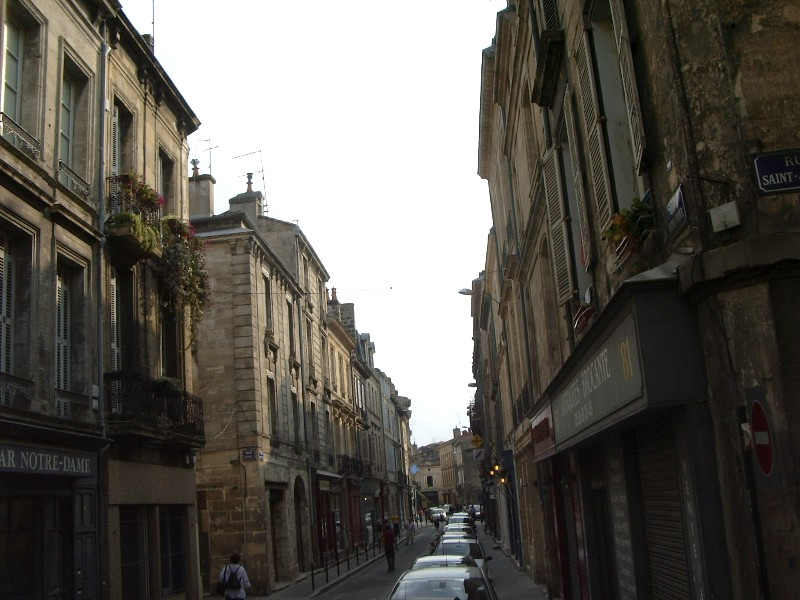 aperçu d'une rue d'"antiquaires" dans le quartier des Chartrons